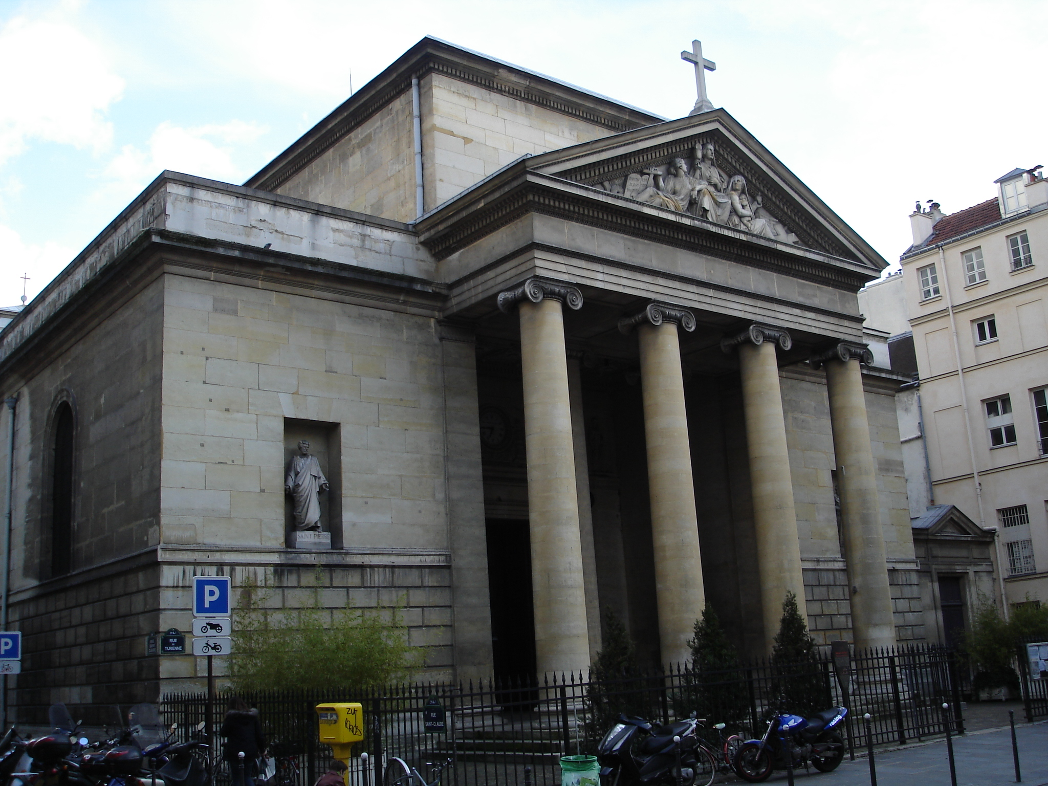 Eglise Saint-Denys-du-Saint-Sacrement, rue de Turenne in Paris- General view